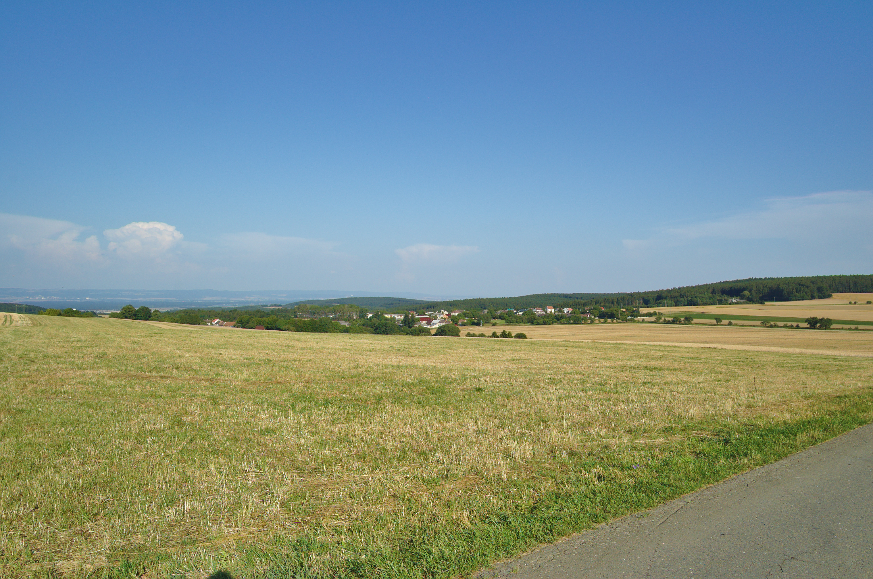 Pohled na obec ze západu, Slavětín, okres Olomouc